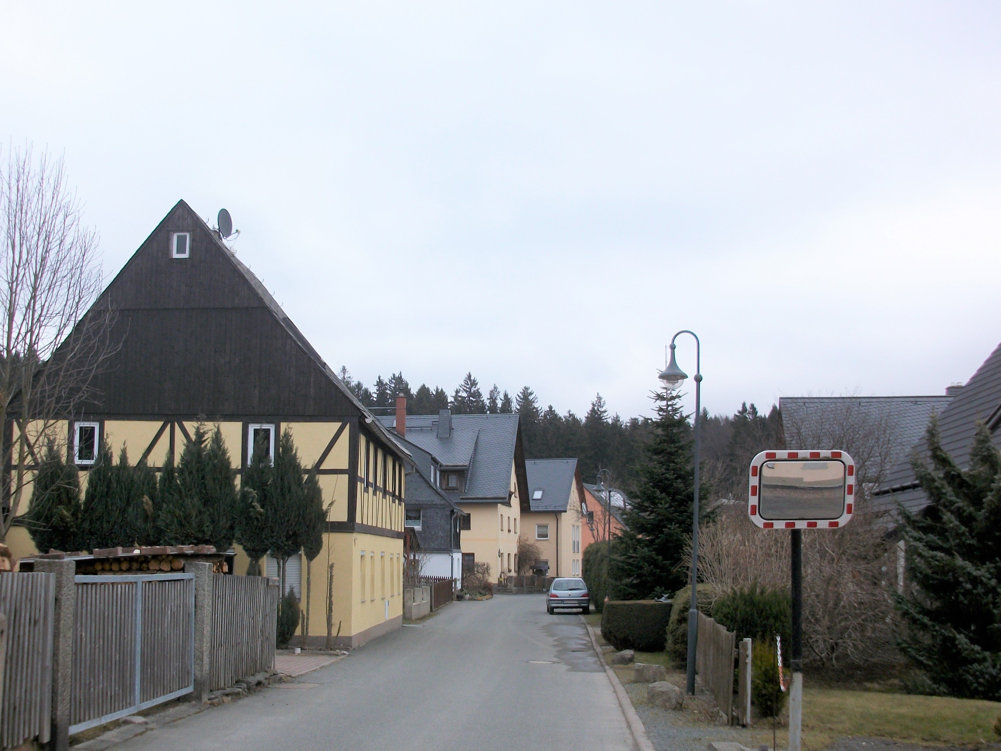 Streitwald (Lößnitz), Forststraße